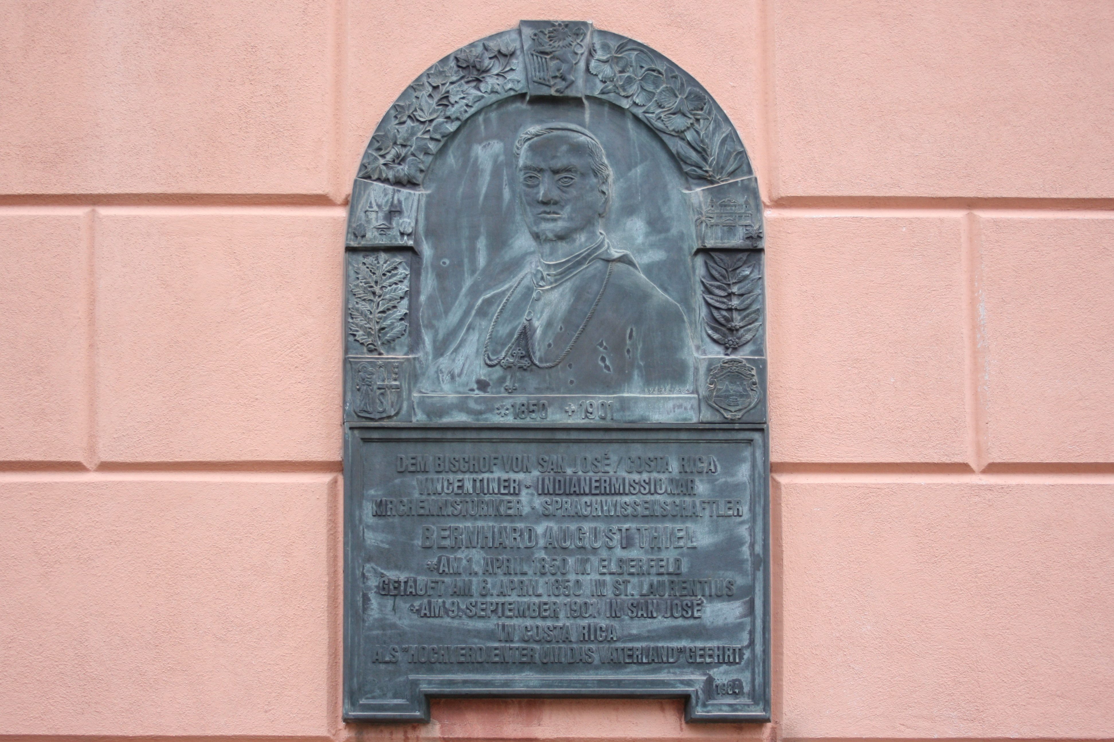 Sankt Laurentius in Wuppertal